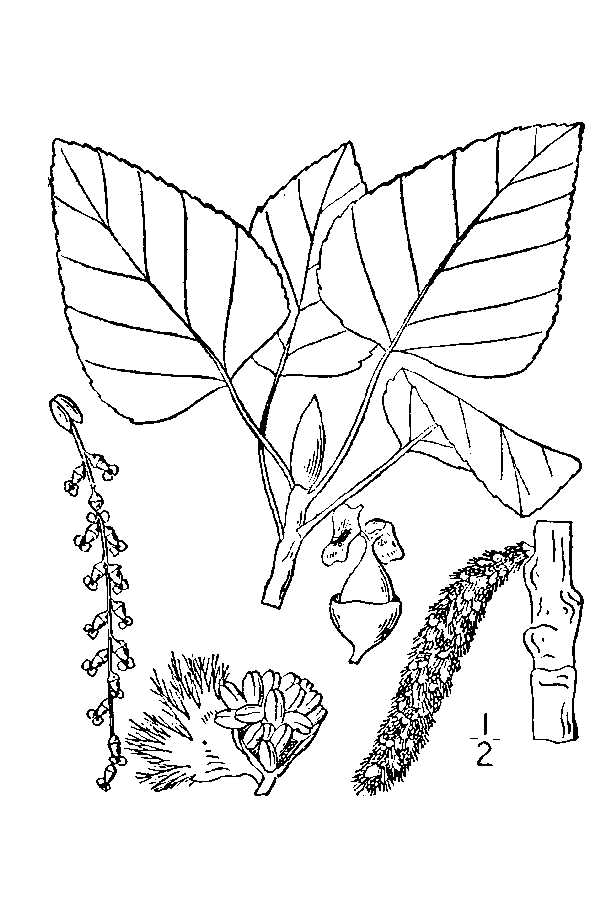 Populus balsamifera L. - balsam poplar